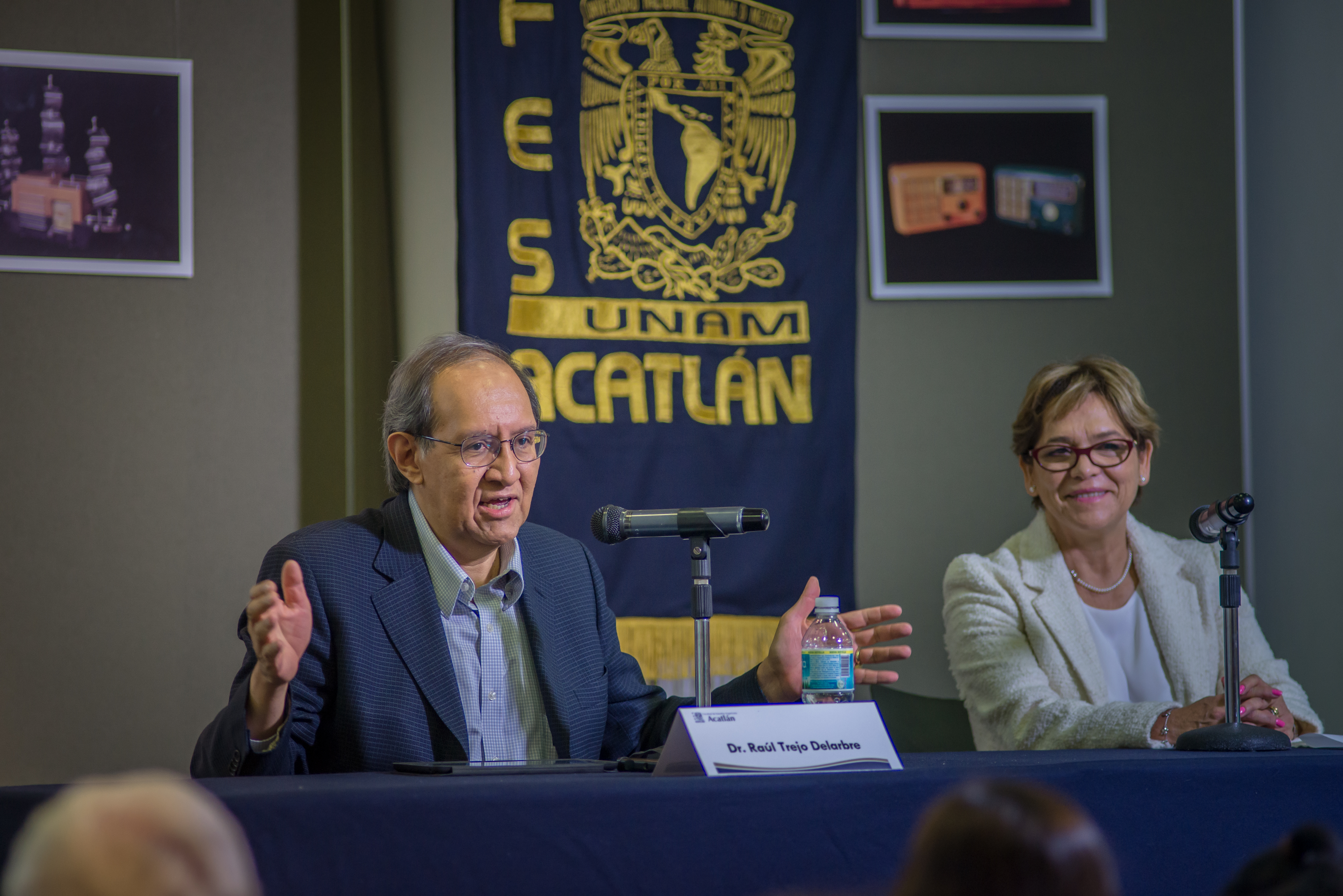 Raúl Tejo Delarbre y Virginia Medina Ávila durante el Tercer Coloquio de Radio y Cultura “Convergencia Mediática”, llevado a cabo en la FES Acatlán - UNAM el 29 de septiembre de 2014. Fotografía: Departamento de Estudios de Imagen Institucional - FES Acatlán, Ramón San Andrés Romero